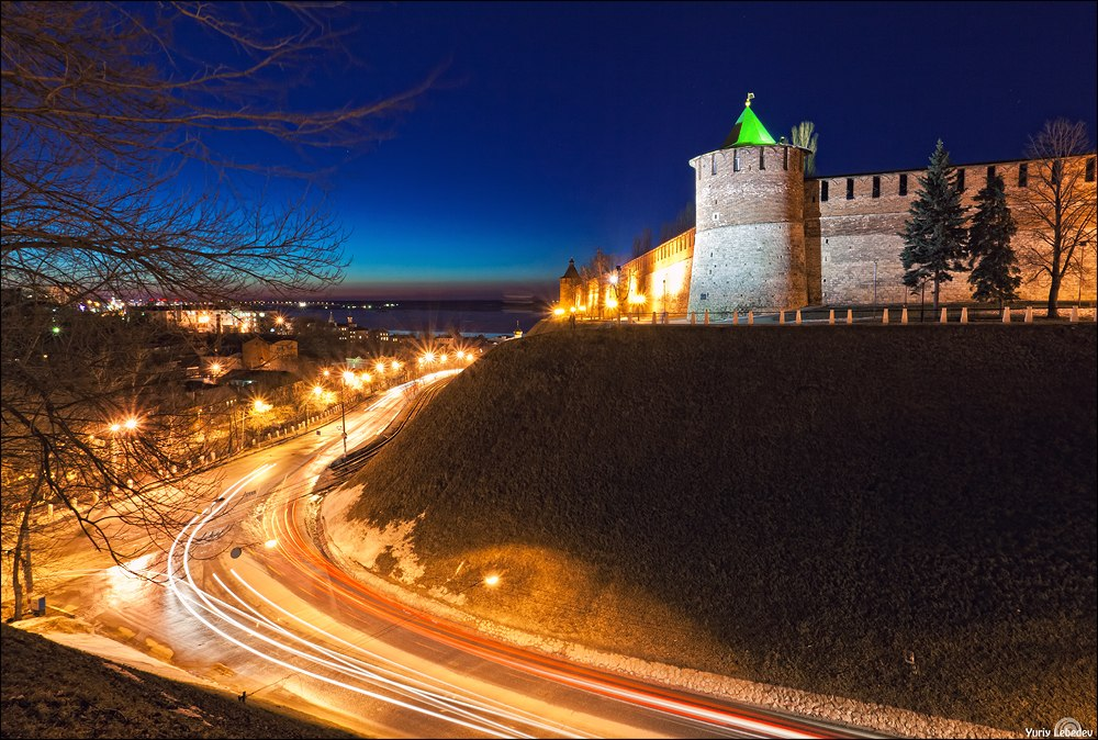 Коромыслова башня Нижегородского кремля ночью